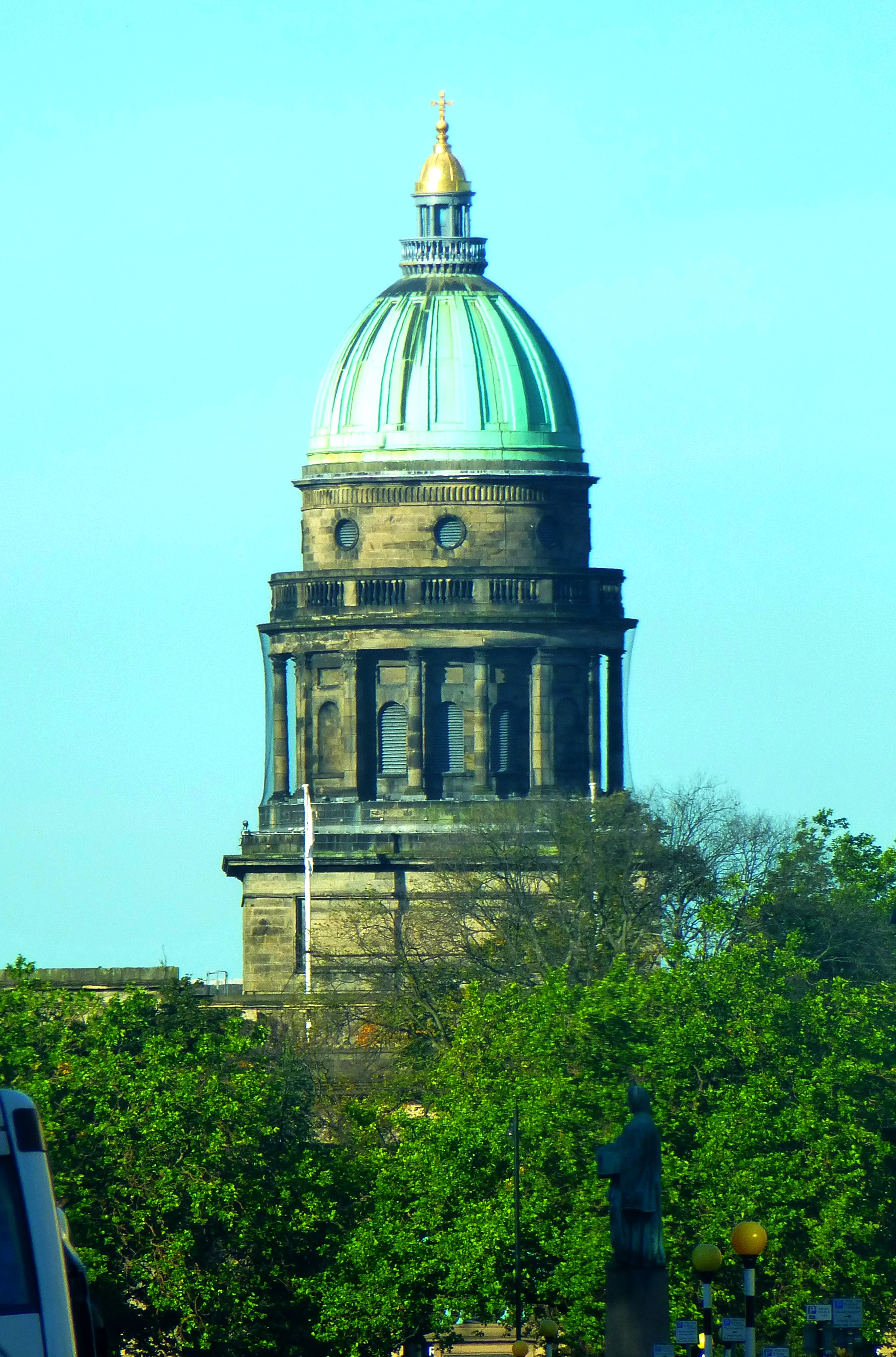 Edinburgh - West Register House